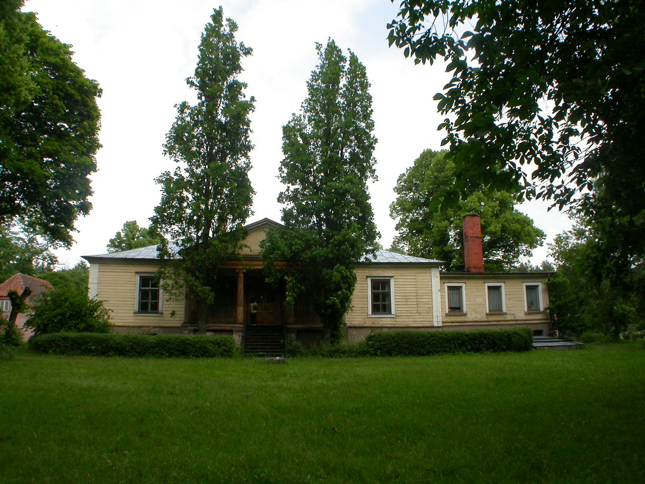 Bonaventūras muiža (19. gadsimts). Klasicisms. Atrodas pie Latvijas Etnogrāfiskā brīvdabas muzeja.